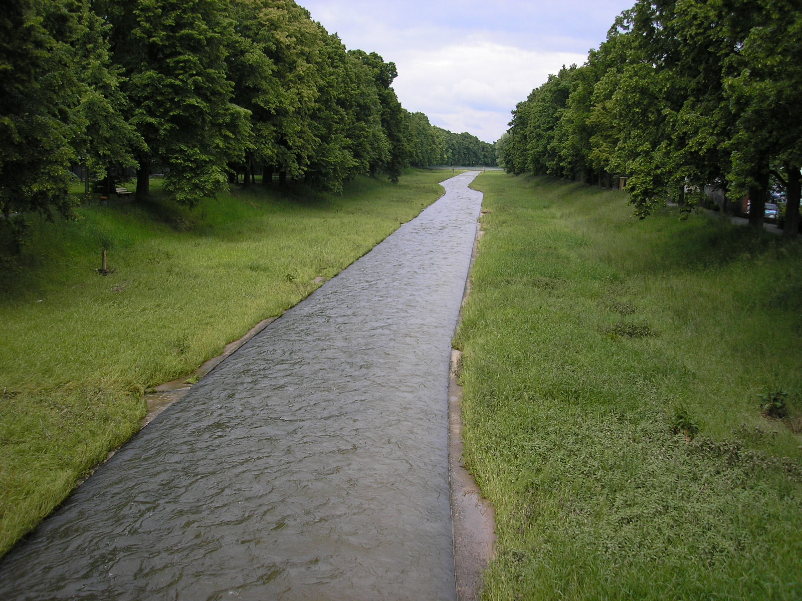 Der Rote Main in Bayreuth